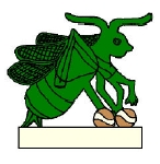 Glifo Náhuatl del municipio de Chapulhuacan,Hidalgo